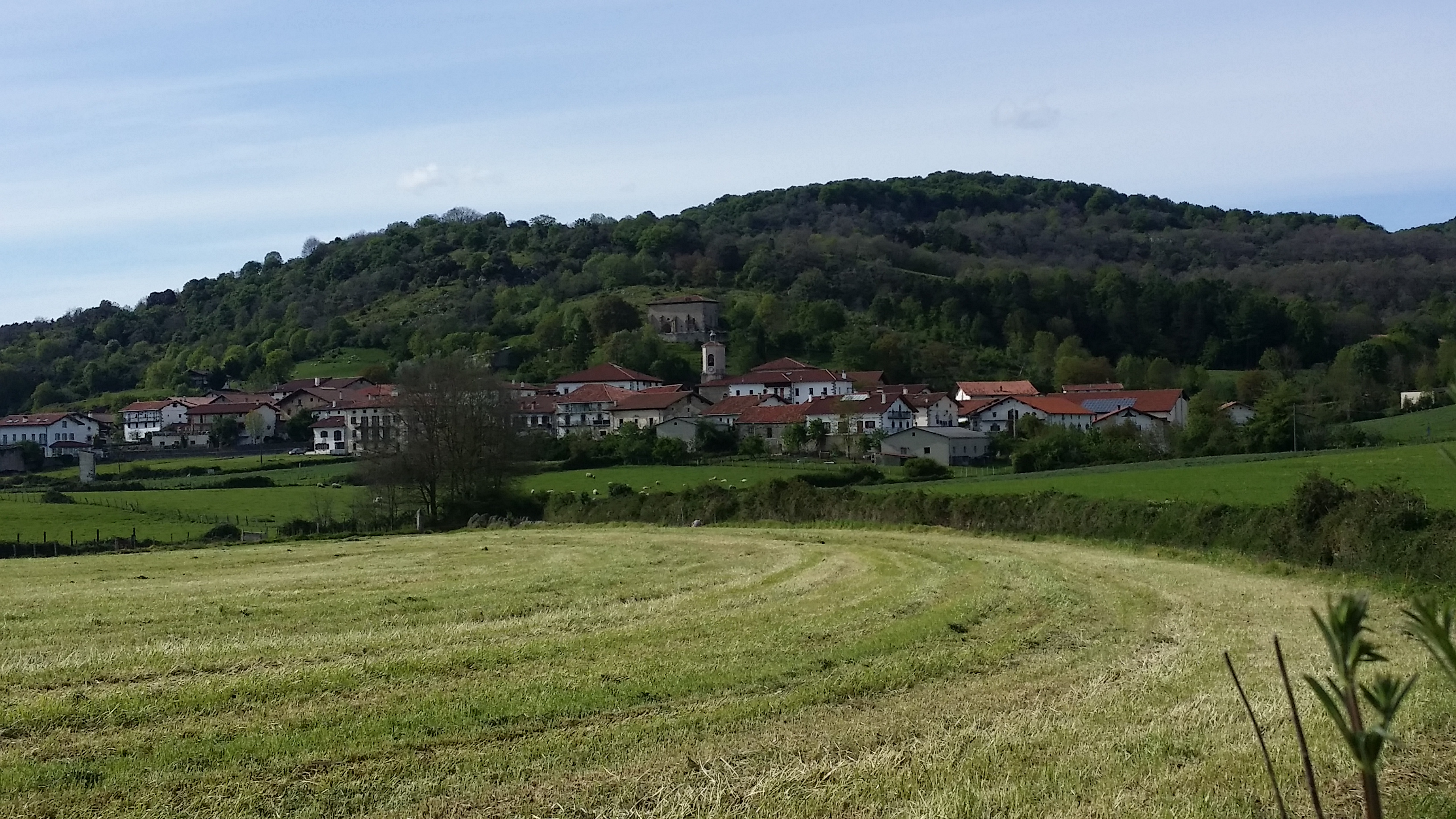 Aldatz, ikuspegi orokorra